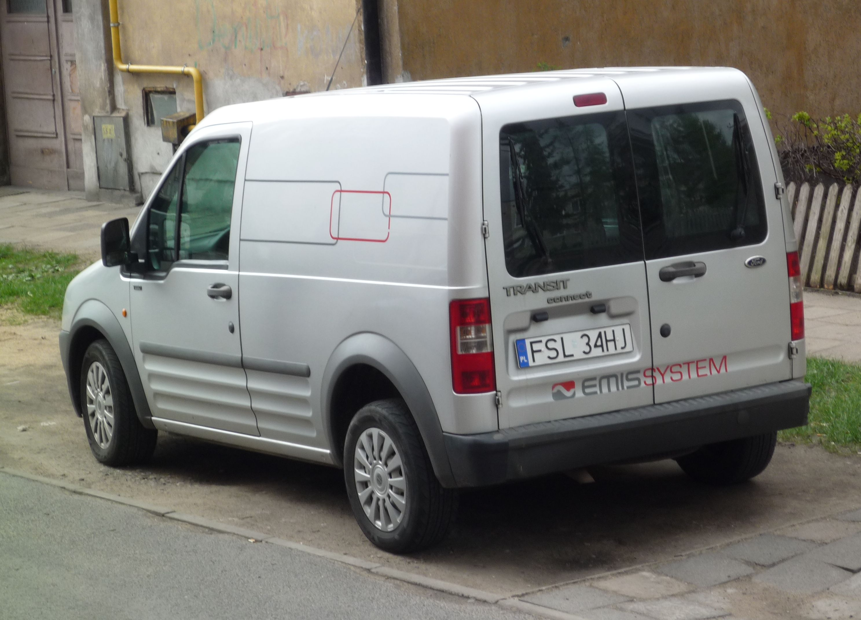 Ford Transit Connect w Słubicach.